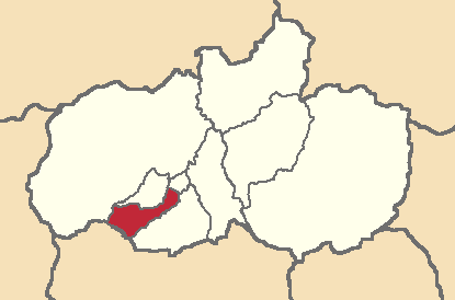 Mapa localizador del cantón en Tungurahua, Ecuador